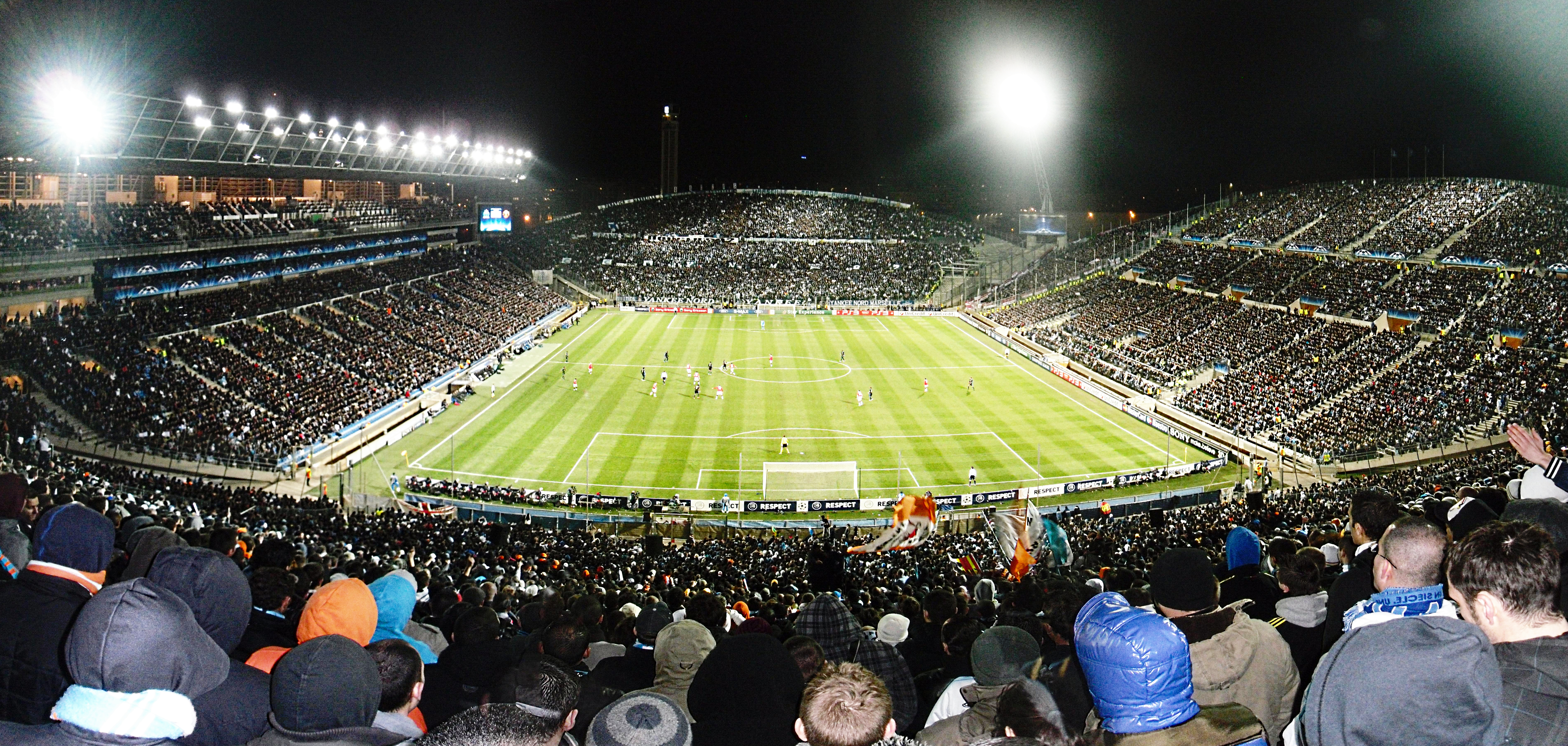 Le Stade Vélodrome durant le match de ligue des champions OM-Manchester United (0-0) le 23 février 2011 comptant 57957 spectateurs.